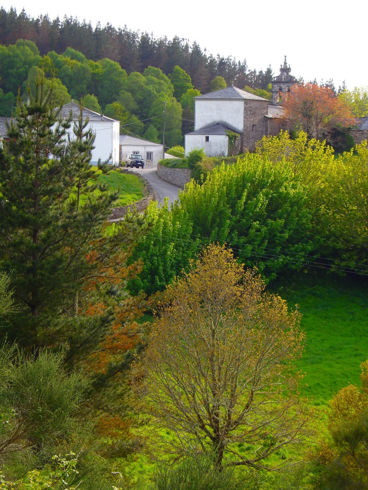 Ver título.